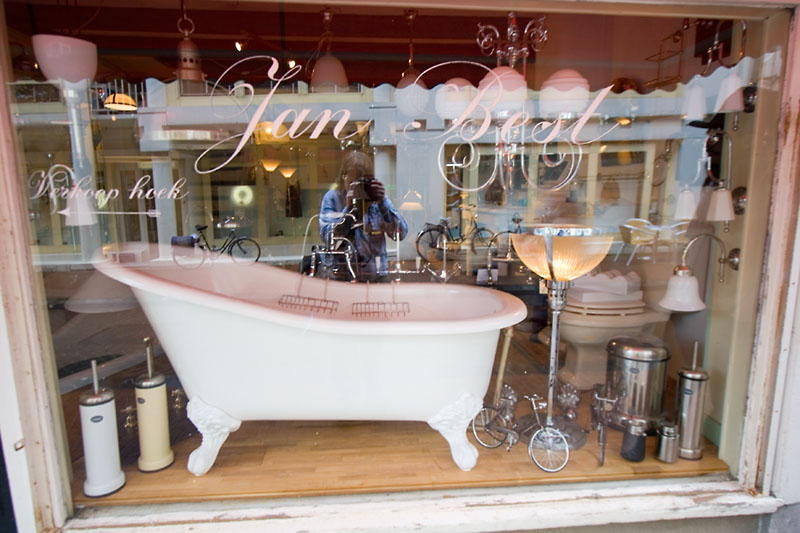 Slipper bathtub in Amsterdam store window.